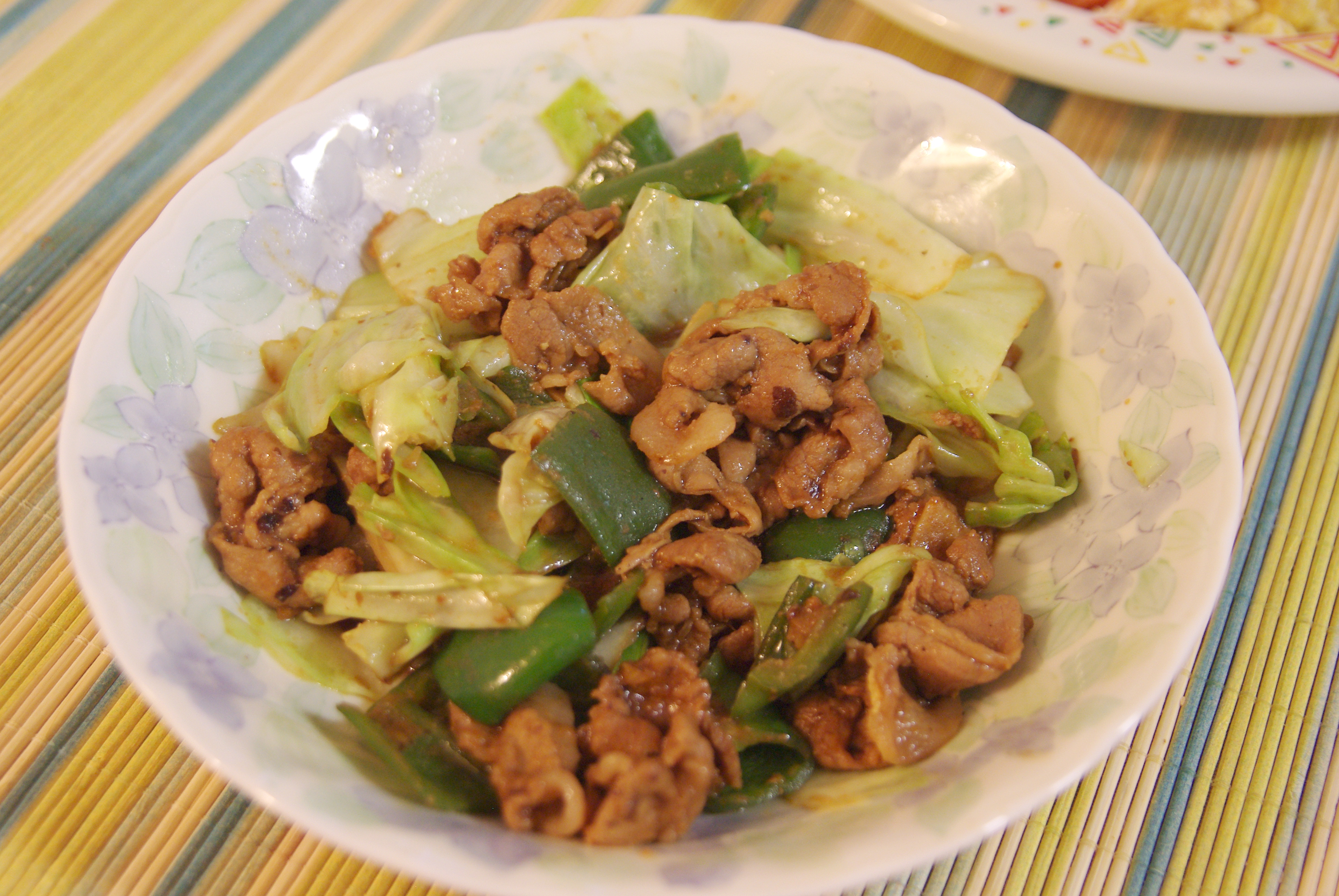 húi gūo ròu